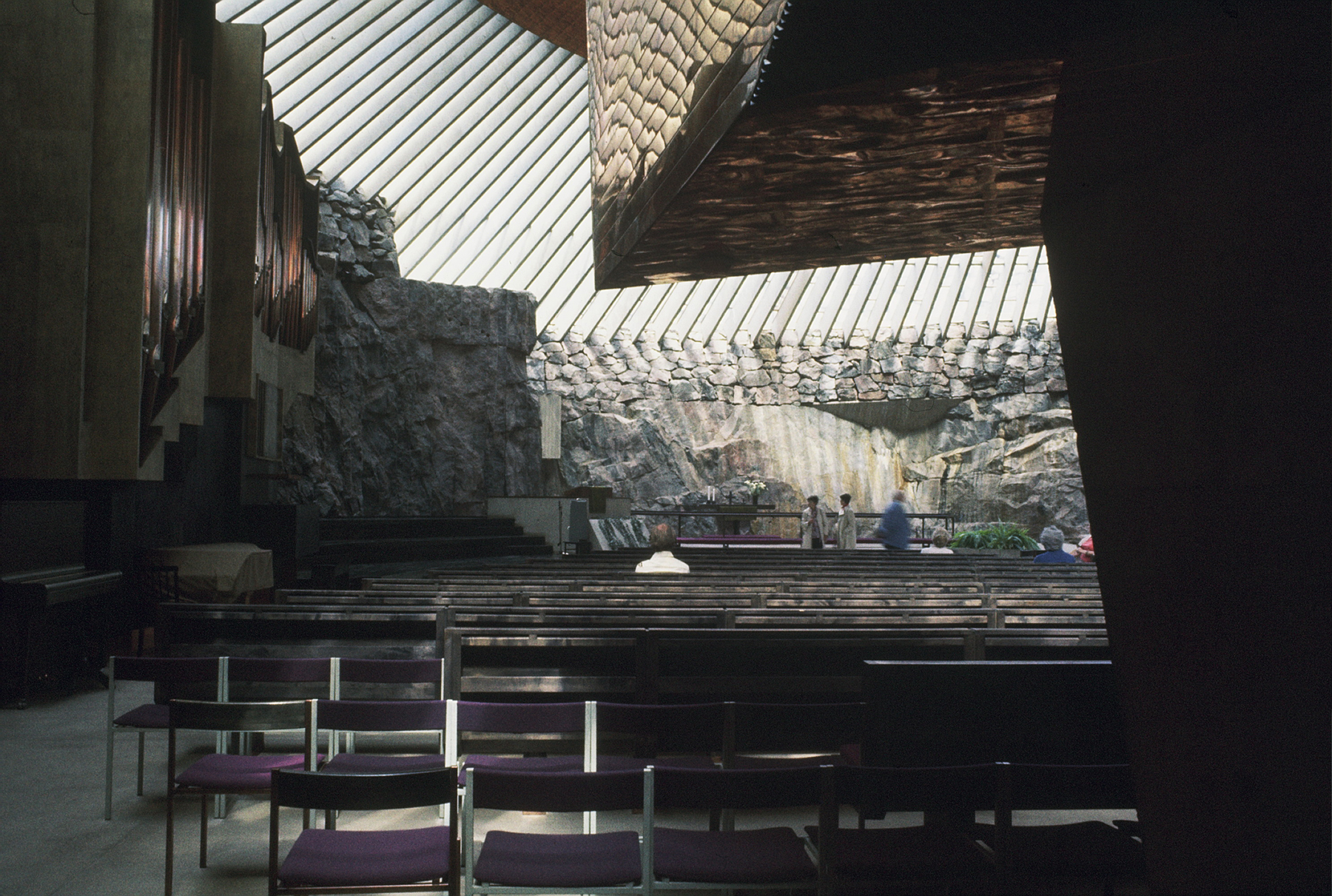 Temppeliaukion kirkko. Salinäkymä lehterin alta. Helsinki, Finland.